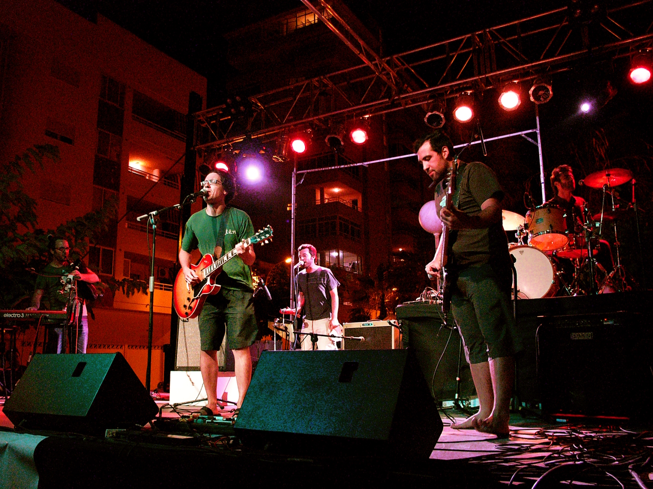 Majorcan folk pop band Oliva Trencada performing live, open air, in Tavernes de la Valldigna's Pop al Carrer